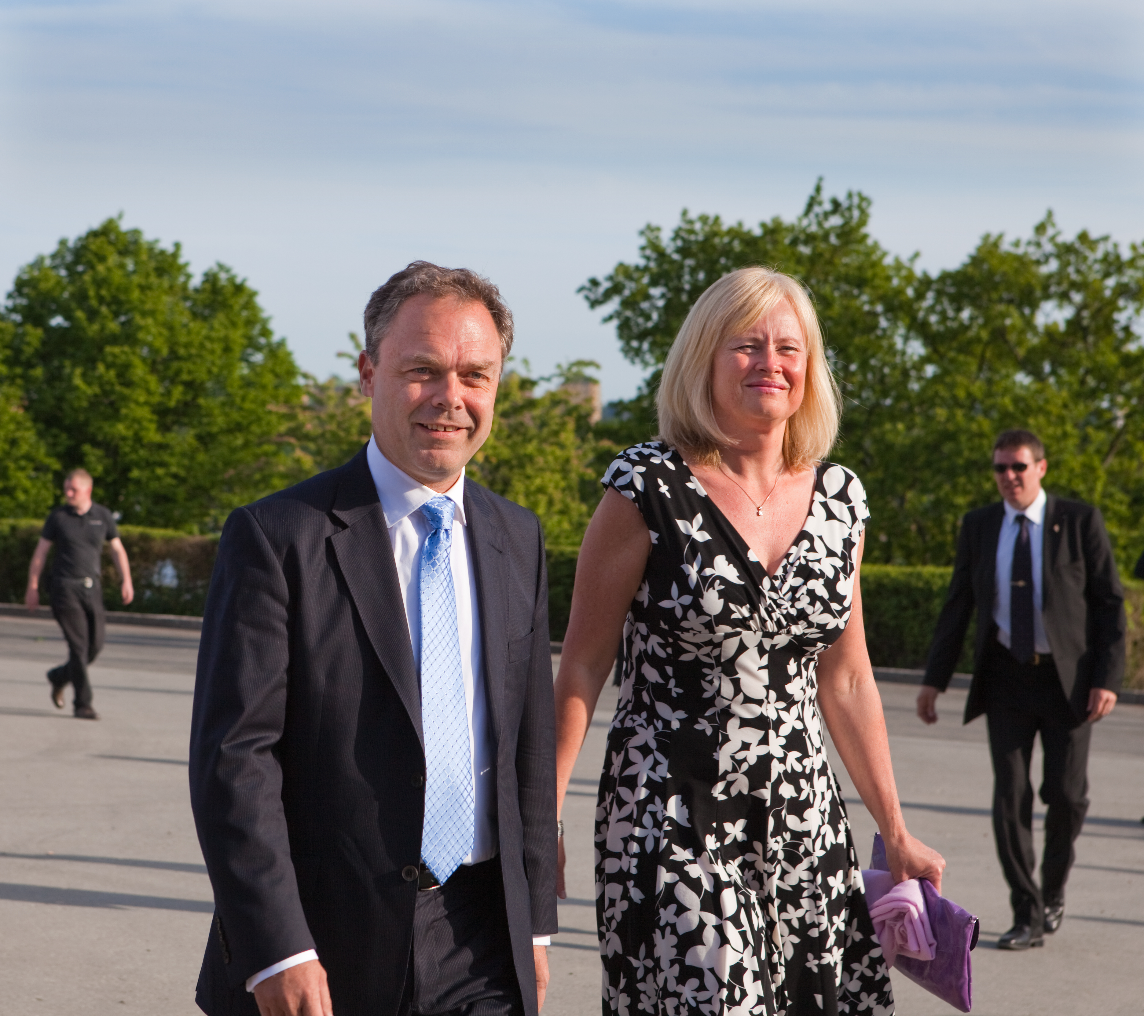 Jan Björklund, Swedish minister of education, Skansen, Stockholm, 2010